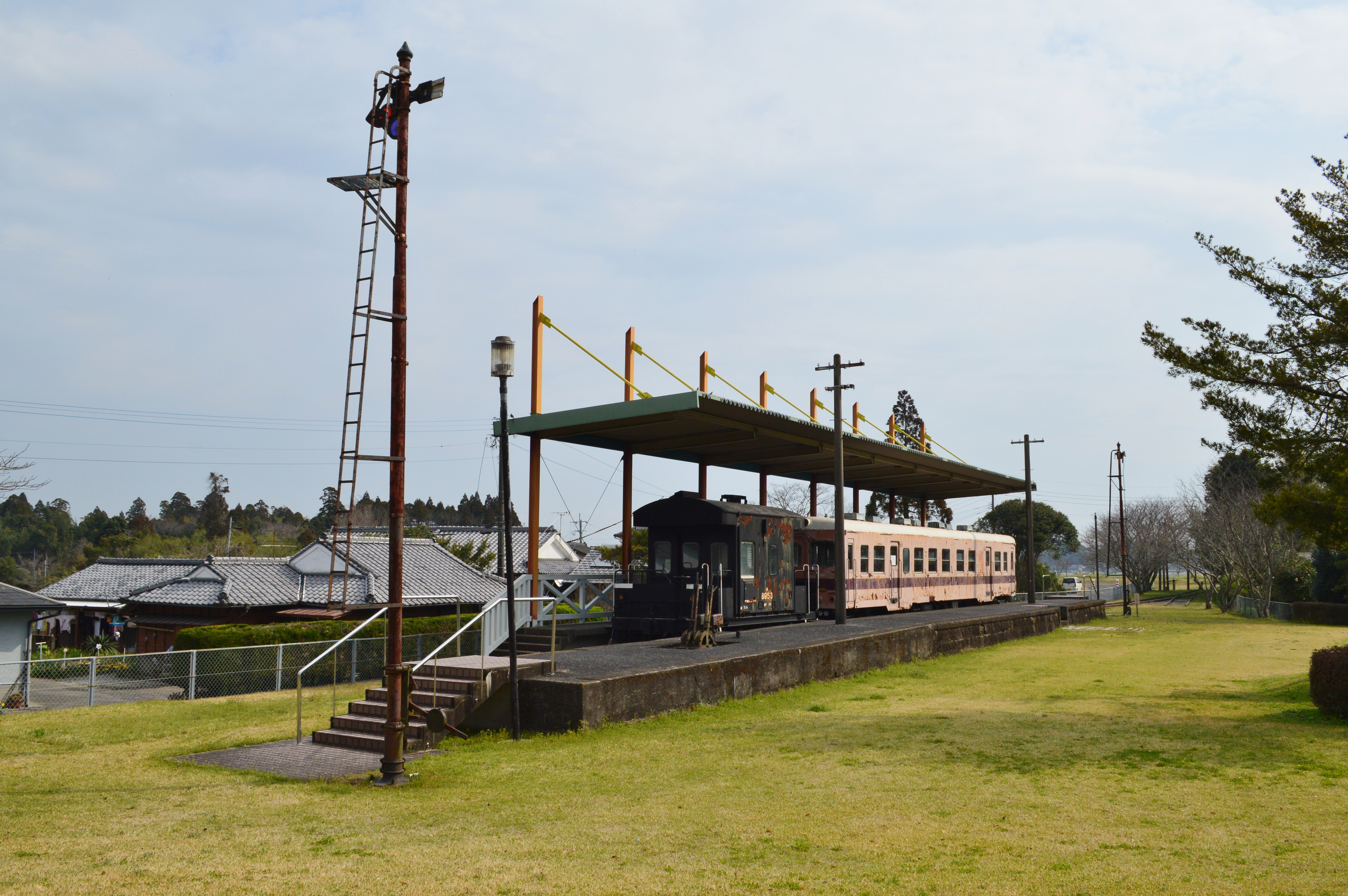 吾平駅跡 概観